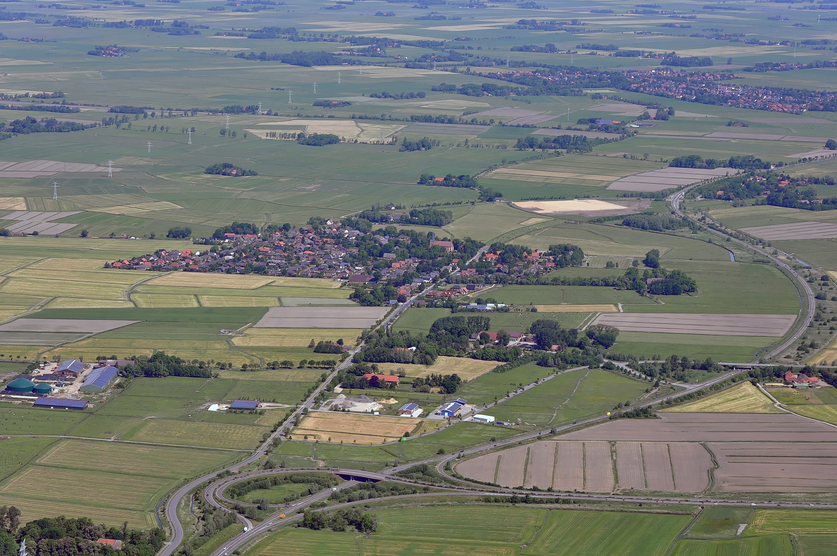 Esenshamm bei Nordenham. Die große Straße ist die B 212. Luftbilder von der Nordseeküste 2012-05